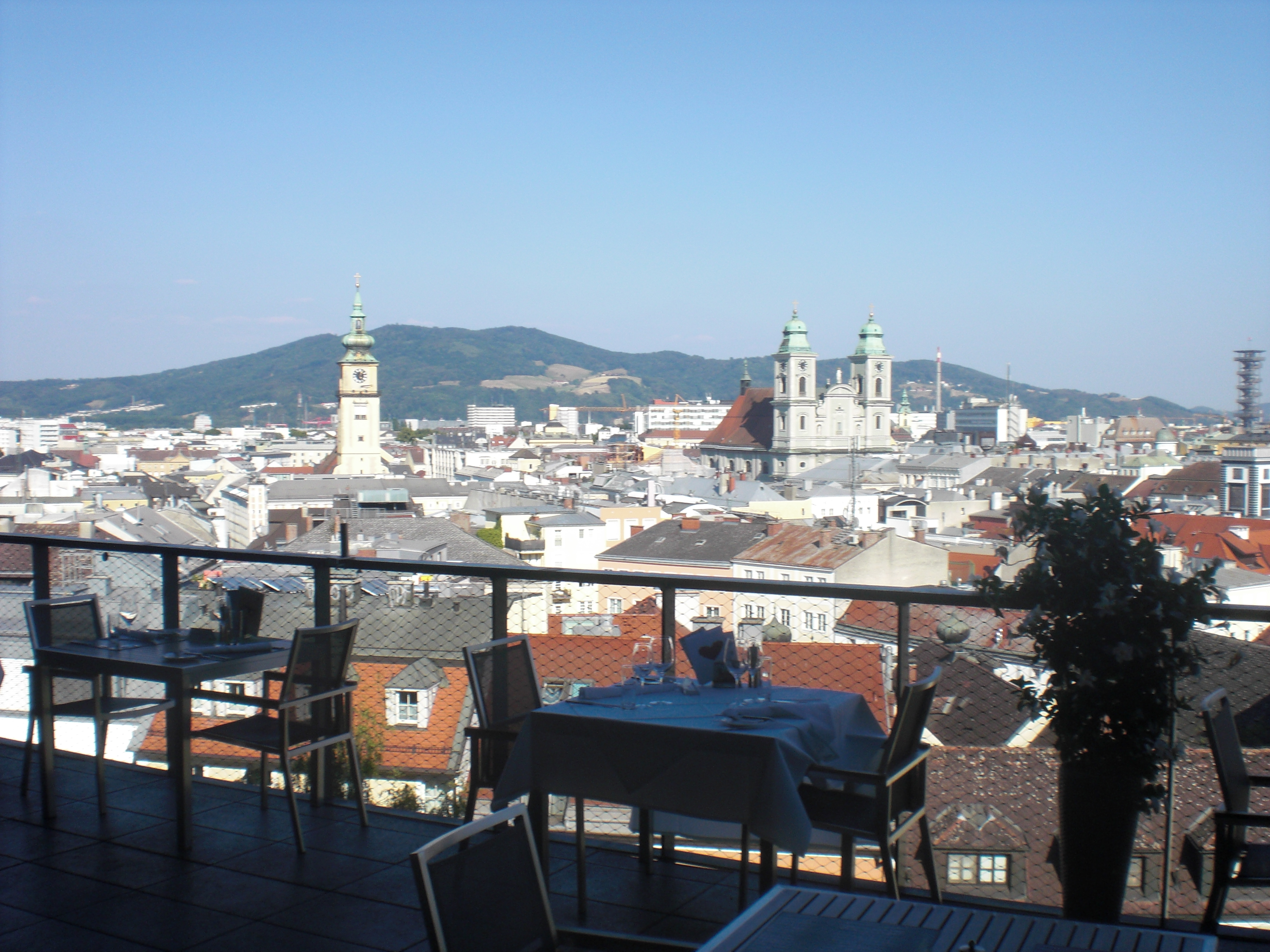 Panoramo de Linz